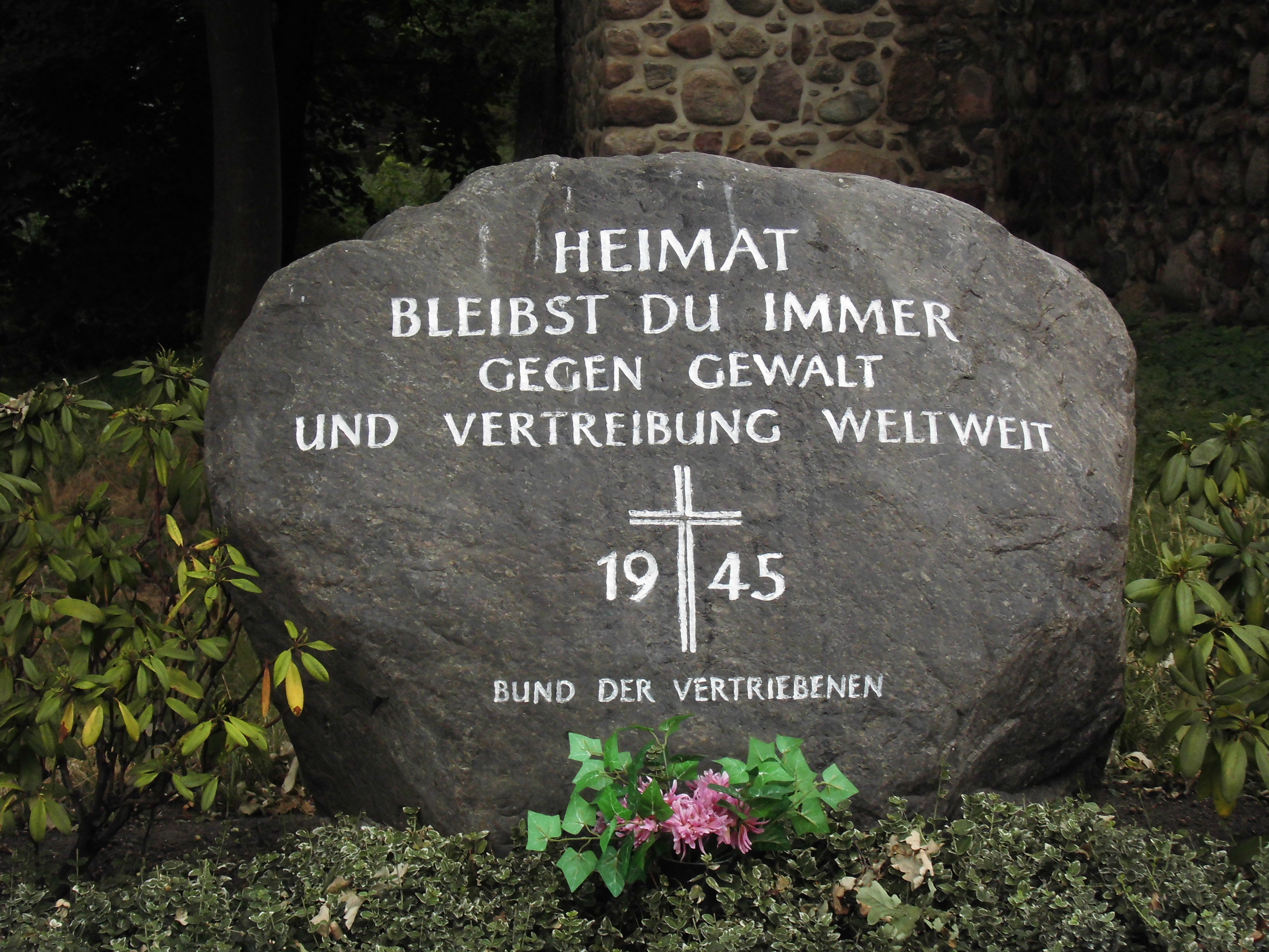 Gedenkstein gegen Gewalt und Vertreibung, errichtet vom Bund der Vertriebenen